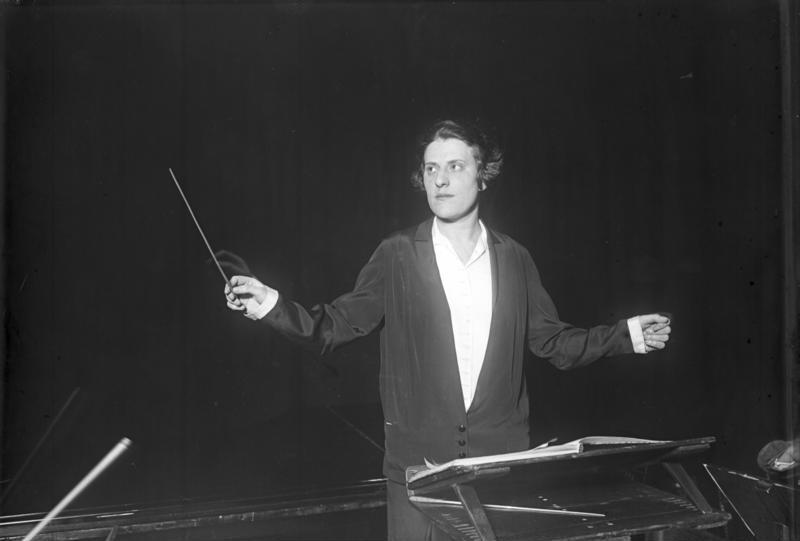 Die erste amerikanische Dirigentin Antonia Brico dirigiert in der Philharmonie in Berlin! Die erste amerikanische Dirigentin in Berlin. Antonia Brico am Dirigentenpult in der Philharmonie.